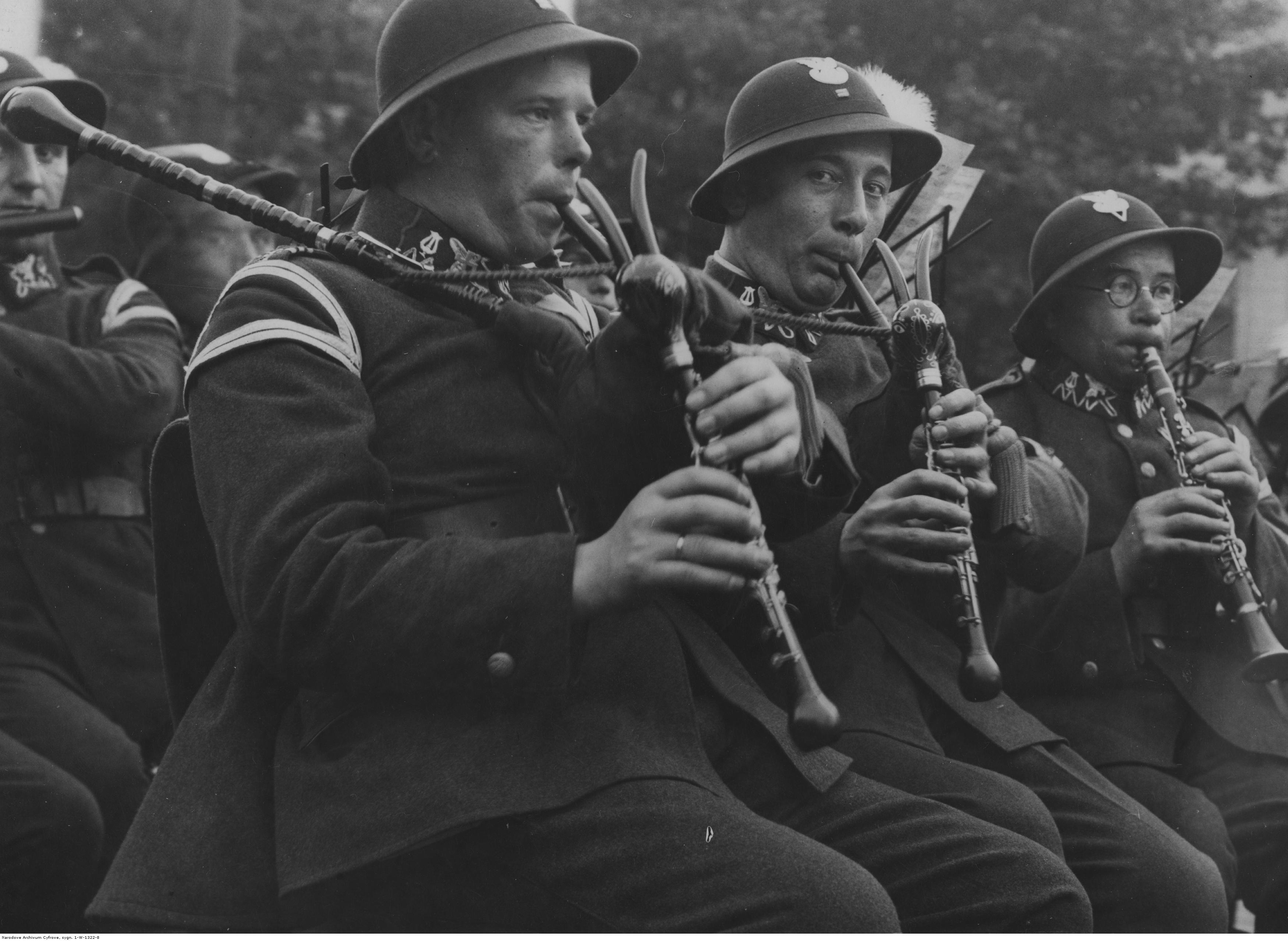 Wizyta 5 Pułku Strzelców Podhalańskich w Krakowie - dudziarze w orkiestrze pułkowej; 1935 r. Koncern Ilustrowany Kurier Codzienny - Archiwum Ilustracji. Sygnatura: 1-W-1322-8